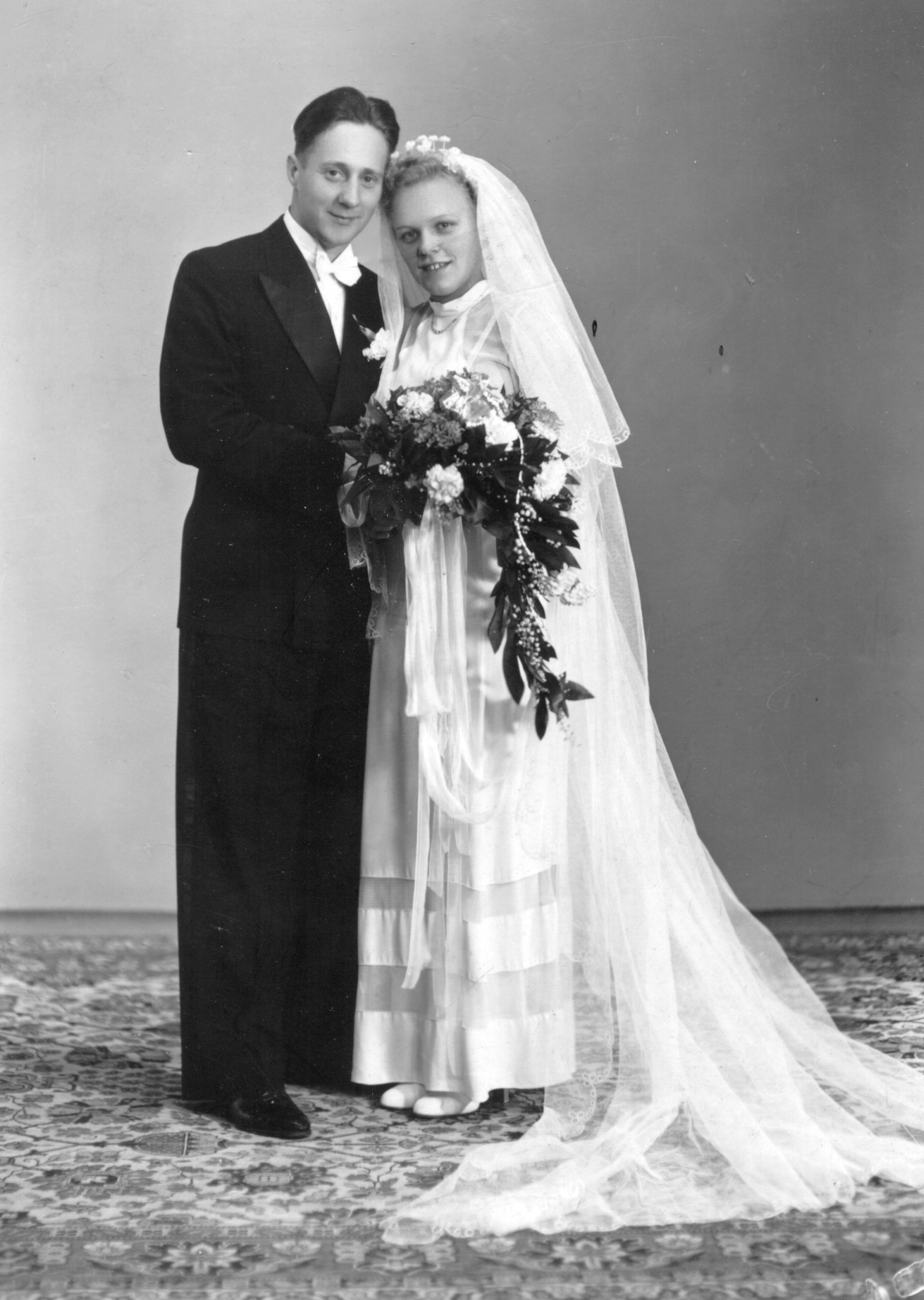 Brudeparet Oskar Hoddø (f. 1916 i Namsos, d. 1943) og Inger Langaas (f. 1920 i Strinda, d. 2002), gift 1941. Bosatt i Trondheim. Oskar deltok i motstandsarbeid under 2. verdenskrig, ble tatt til fange, og henrettet på Kristiansten festning 17.11.1943. Han er forfatteren bak sangen "Nidelven stille". Inger (senere g. Stedenfeldt) var datter av Arne og Lorentze Langaas på Bybakk (Bromstadvegen 24) i Strinda, se Norges Bebyggelse Sør-Trøndelag østre del I-II, s. 1148. Hennes farfar var Anton Langaas (f. 1872 i Åsen), se Bygdebok for Åsen bind 5, s. 412. Fotograf / Photographer: Ukjent Fotoeier / Photo owner: Svenn-Erik Langaas Digitalisering / Digitizing: Arne Langås Foto-ID / Photo ID: 073-0001 Hvis bildet gjengis i andre sammenhenger, oppgi Åsen Museum og Historielag, fotoeier og fotograf som kildereferanse. Har du utfyllende opplysninger? Legg gjerne igjen en kommentar nedenfor eller send e-post til . | If you re-use this photo, please refer to Åsen Museum og Historielag, the photographer and the owner of the photo. Do you have additional information? Please leave a comment or send an e-mail to .